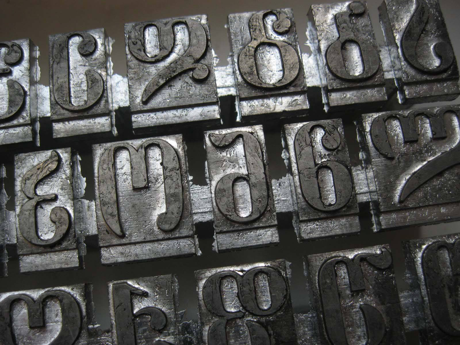 მსხვილკეგელიან სტრიქონჩამომსხმელ მანქანაზე ჩამოსხმული მთავრული ლიტერები, ანტონ დუმბაძის დიზაინი.